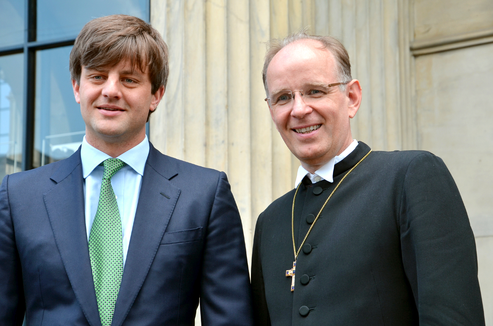 Ernst August Prinz von Hanover und Landesbischof Ralf Meister auf dem Weg in das Opernhaus in Hannover zur Festveranstaltung anlässlich der Eröffnung der Niedersächsischen Landesausstellung 2014 unter dem Titel Als die Royals aus Hannover kamen ...